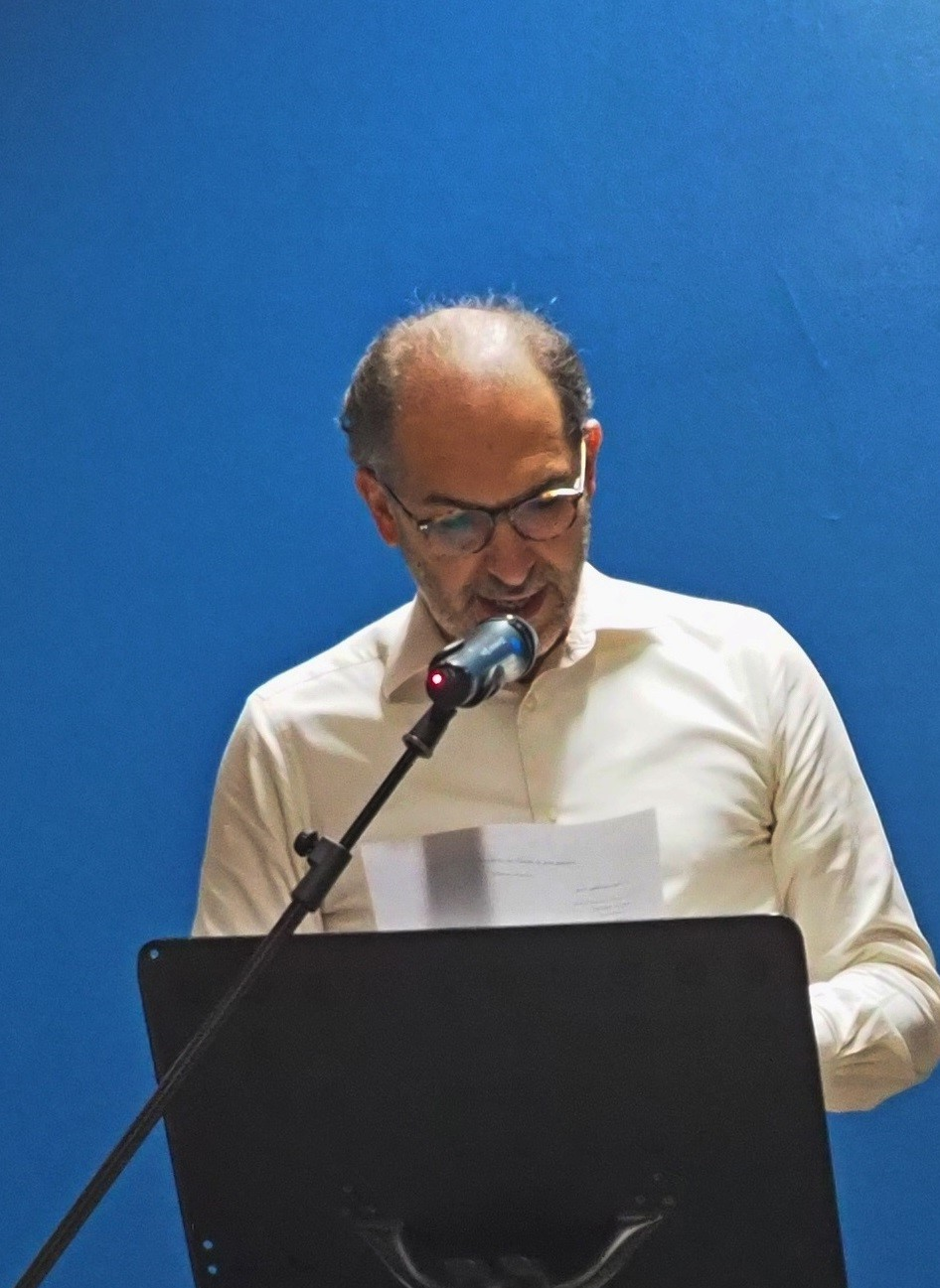 Arben Dedja në Festivalin "Congiunzioni", Mestre 2017